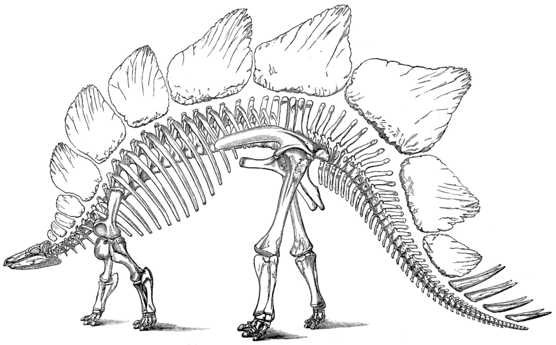 Illustration of Stegosaurus ungulatus